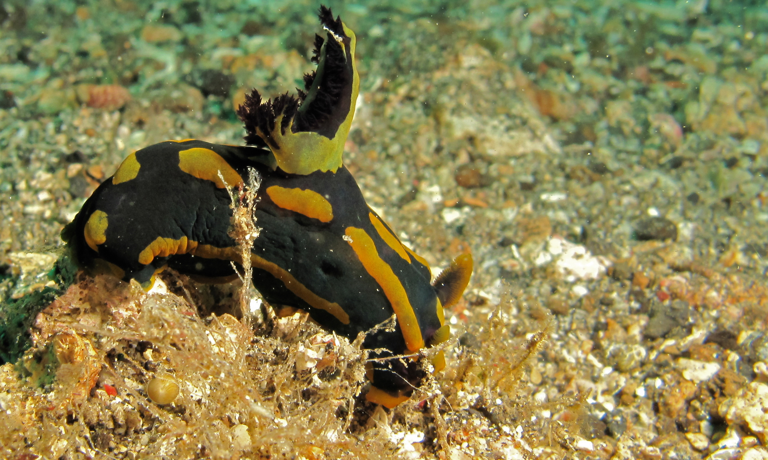 Makawide, Lembeh Strait, Sulawesi, INDONESIA